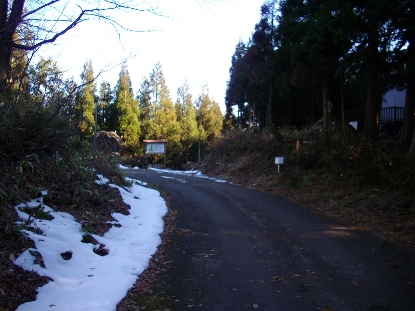 岐阜県道８２号線の峠区間、大洞峠の写真。地図上では大林林道の峠となっている。